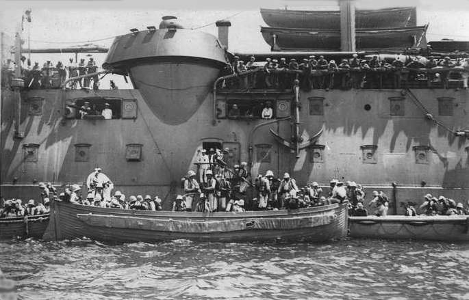 12 juin 1917, les compagnies de débarquement quittent le cuirassé Vérité pour aller s’emparer des forts du Pirée